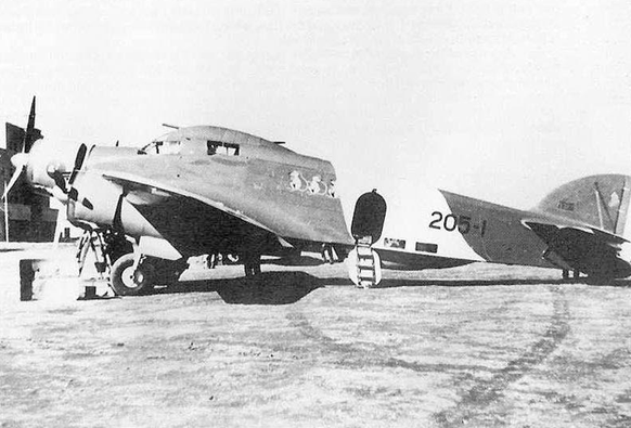 Savoia Marchetti SM.79 XII stormo Sorci verdi